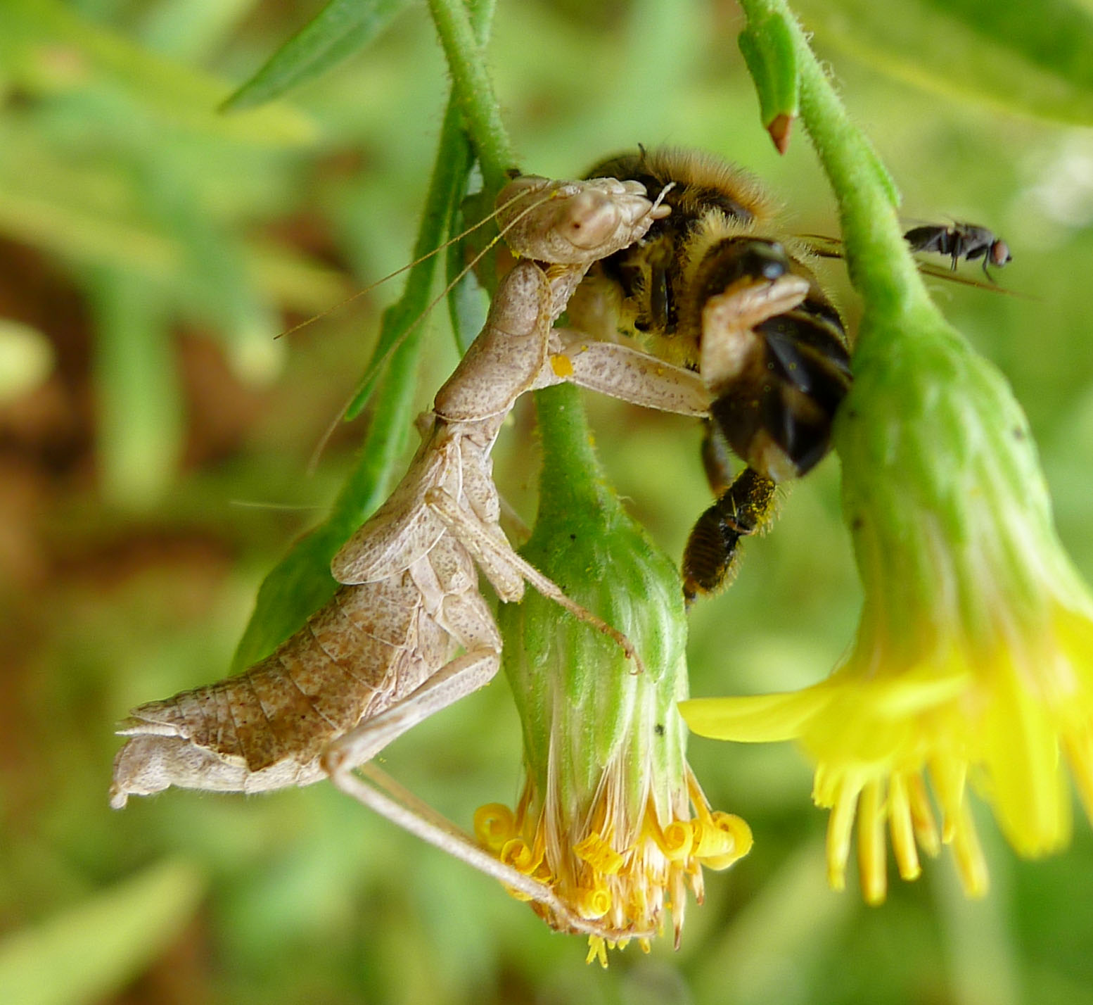 Ameles spallanzania. Mantidae. Lunch